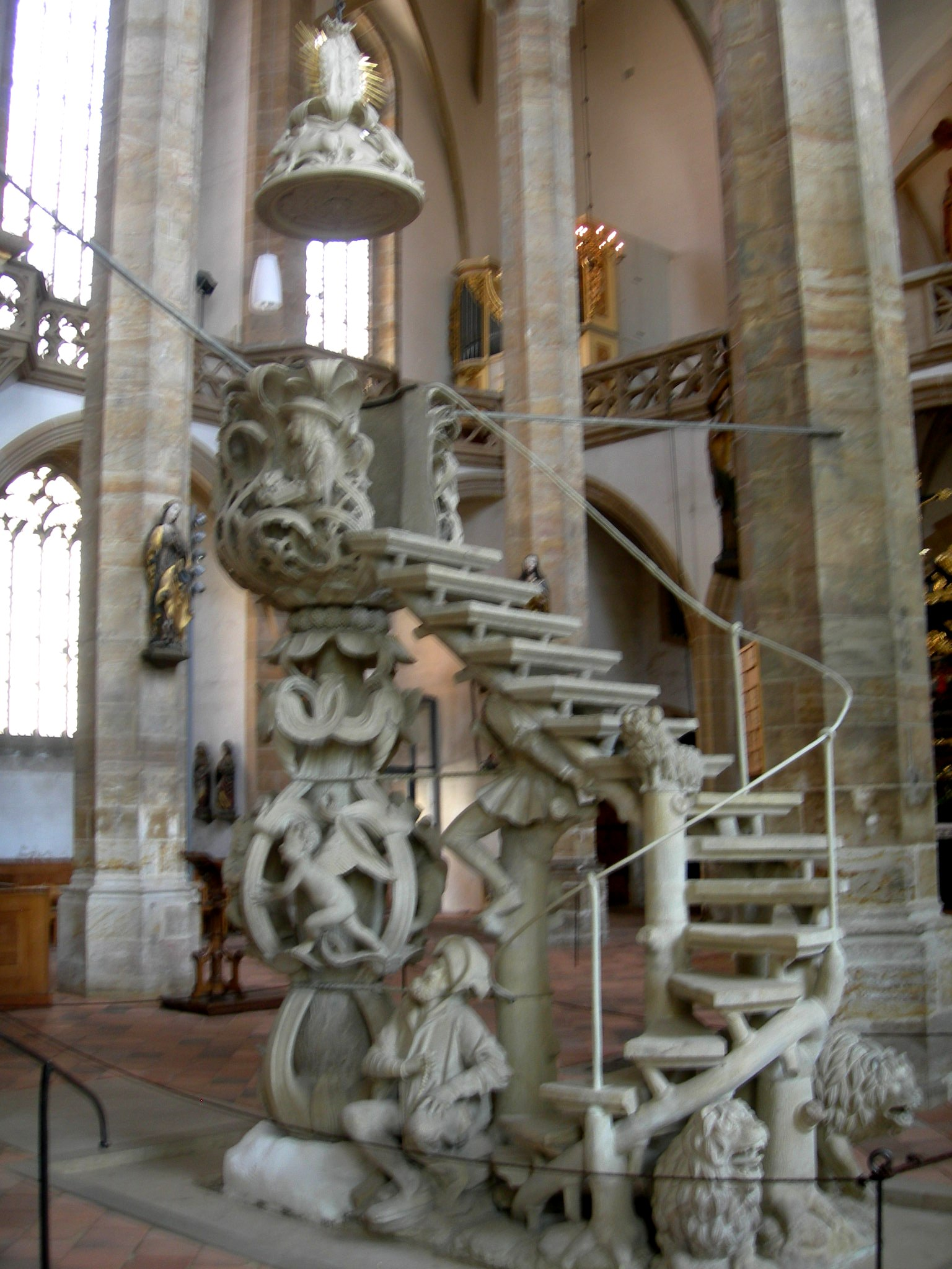 Freiberg, Dom St. Marien, Tulpenkanzel. 1505